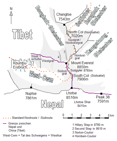 Lage des Mount Everest